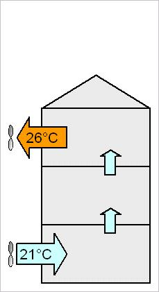 AktiveNachkühlung-Lüftung